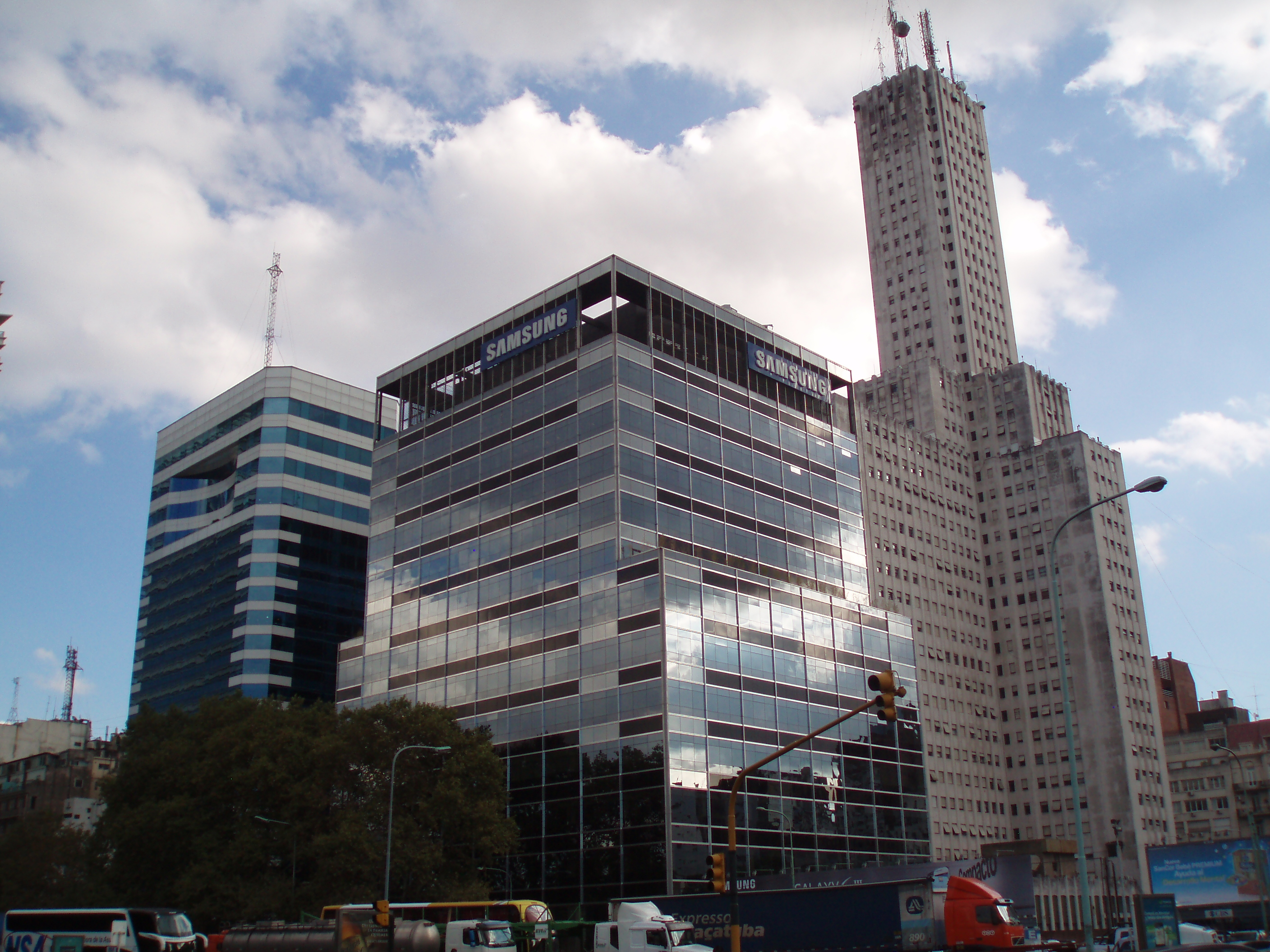 Edificio Samsung en Buenos Aires (Bouchard 710).